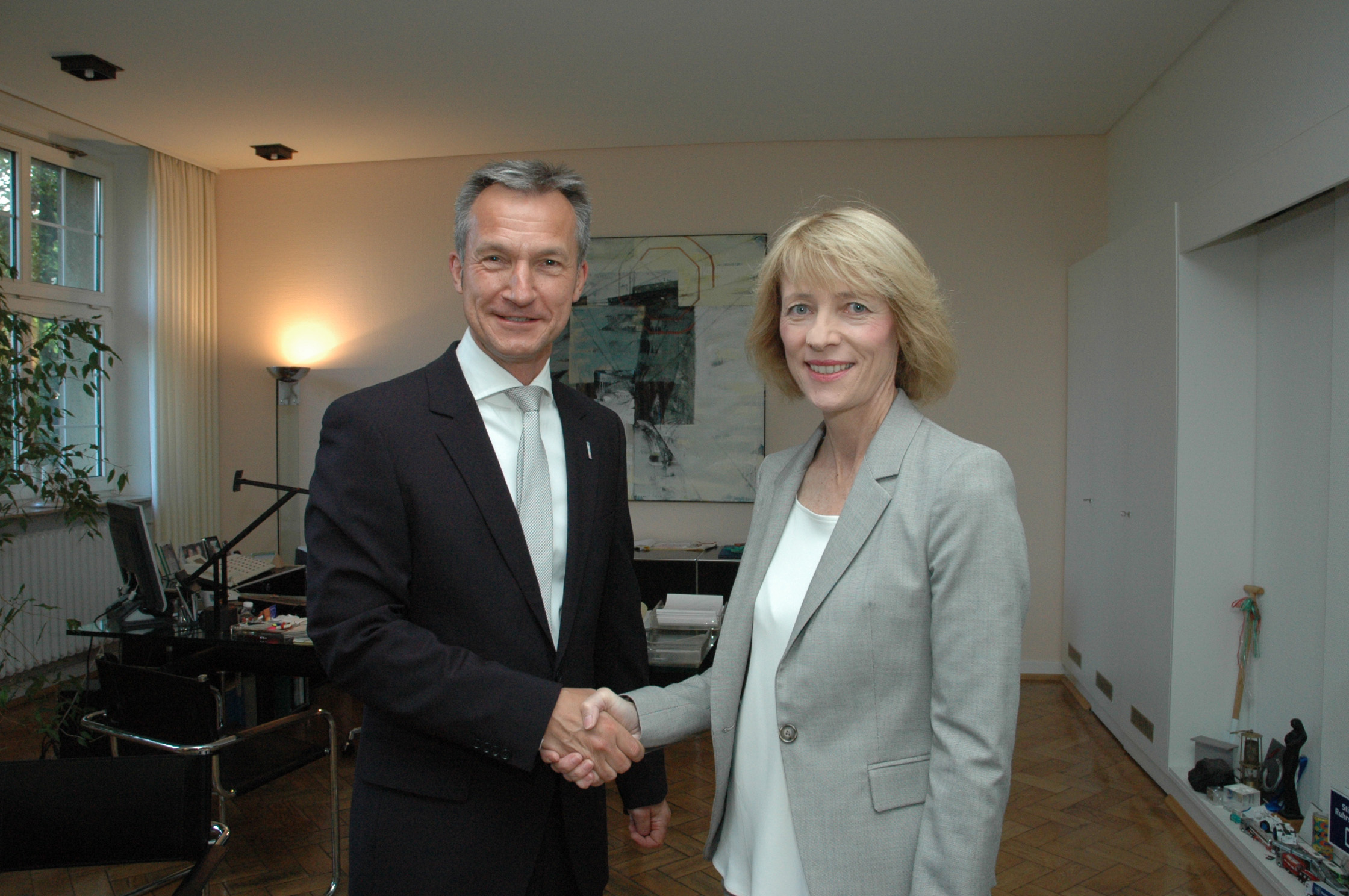 Oberbürgermeister begrüßt Karin Welge zum Dienstantritt Neue Beigeordnete für Arbeit und Soziales, Gesundheit und Verbraucherschutz GE. Oberbürgermeister Frank Baranowski hat heute Morgen in seinem Dienstzimmer im Rat-haus Buer die neue Beigeordnete der Stadt Gel-senkirchen, Karin Welge, zum Dienstantritt be-grüßt. Er wünschte ihr eine glückliche Hand und viel Erfolg in Gelsenkirchen. Die 48-jährige übernimmt den Vorstandsbereich Arbeit und Soziales, Gesundheit und Verbrau-cherschutz. Der Rat der Stadt Gelsenkirchen hatte Karin Welge im März 2011 ohne Gegenstimmen gewählt und folgte damit der Empfehlung der Fin-dungskommission. Karin Welge übernimmt die Nachfolge von Henriette Reker, die als Dezernen-tin zur Stadt Köln wechselte. Karin Welge hat Rechtswissenschaften an der Universität des Saarlandes studiert und 1991 ihr zweites Staatsexamen abgelegt. Im Juli 1998 wurde die 48-jährige erste Beigeordnete und Kämmerin der Stadt Xanten und war dort zustän-dig für die Fachbereiche Soziales und Bildung sowie Finanzen und Liegenschaften.